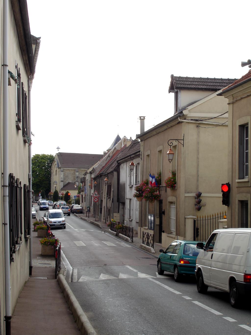 La rue de Gonesse à Bonneuil-en-France (Val-d'Oise), France Vue en direction du sud, au fond, l'église. Août 2007 Photo personnelle (own work) de Clicsouris